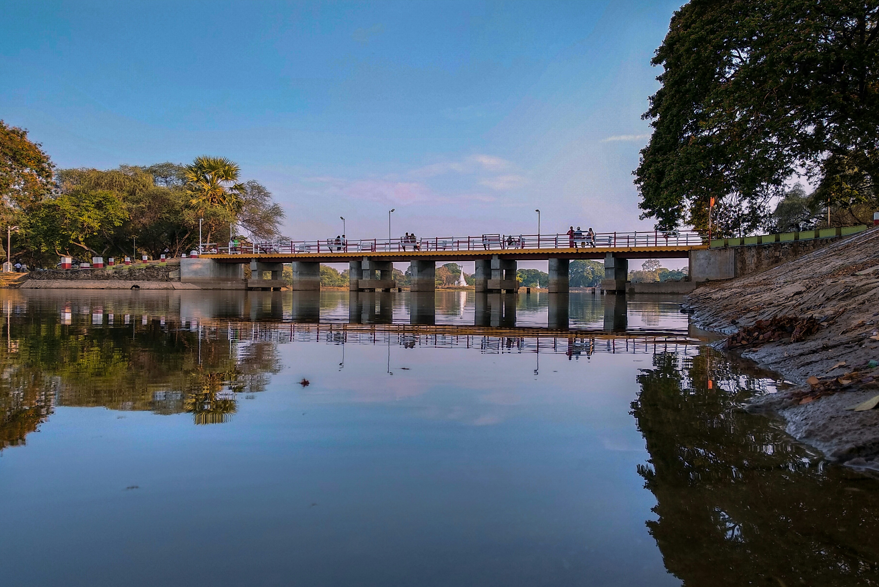 မြန်မာဘာသာ: ရတနာပွင့်လှကန်တော်ကြီးခေါ် ကန်တော်ကြီးသည် မကွေးတိုင်းဒေသကြီး တောင်တွင်းကြီးမြို့ရှိ အများပြည်သူဆိုင်ရာ အပန်းဖြေနေရာတခုဖြစ်သည်။၎င်းသည် ရှေးယခင်ကပင် တည်ဆောက်ခဲ့သော တဖက်ပိတ်ဆည်တစ်ခုဖြစ်သည်။